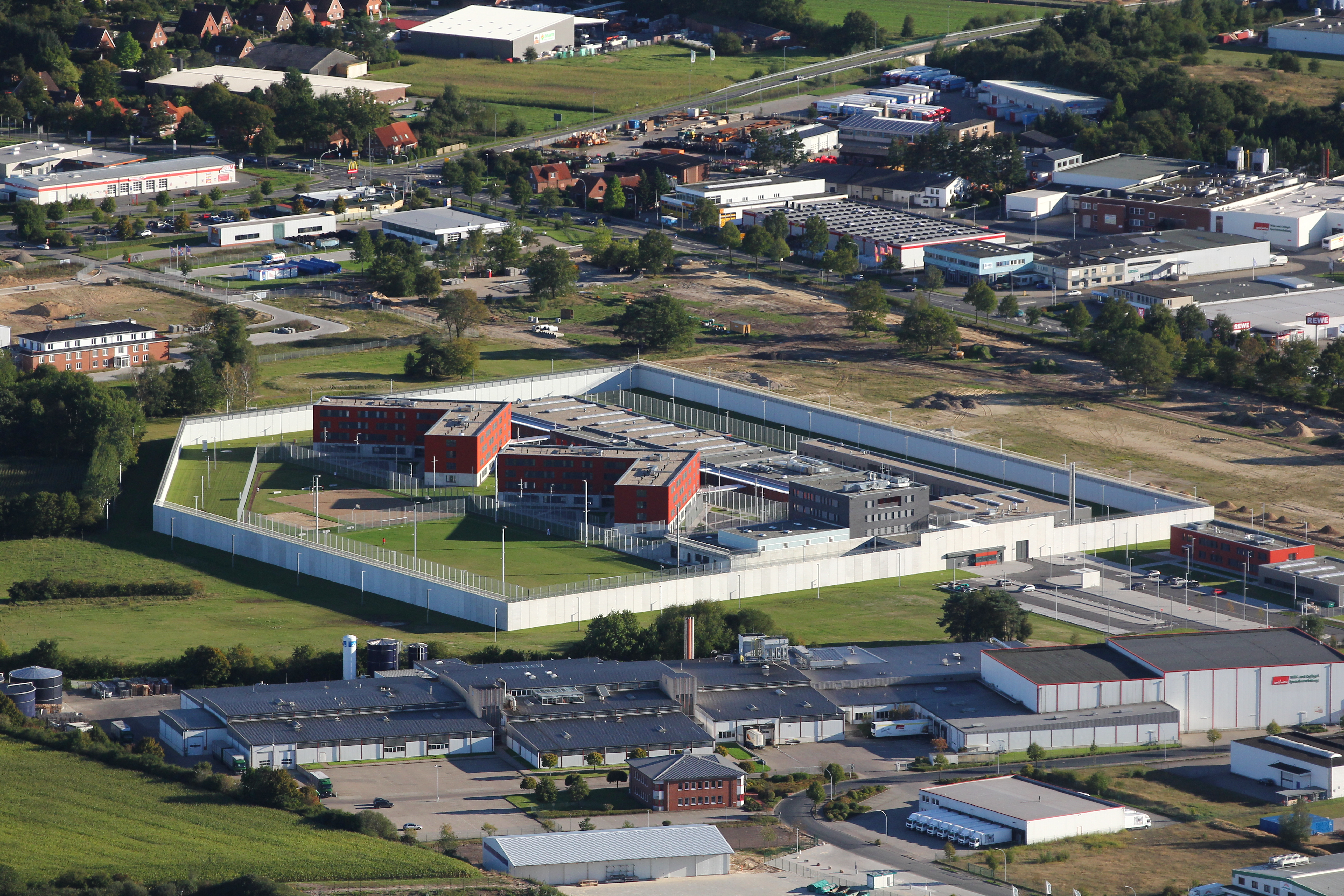 Luftbild: Neue JVA Bremervörde